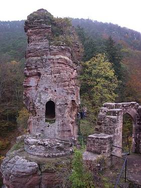 Froensburg im Elsass.